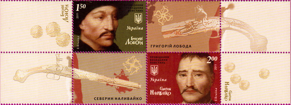 «Провідники козацьких повстань» (зчіпка з двох марок) «Провідники козацьких повстань. Григорій Лобода» «Провідники козацьких повстань. Северин Наливайко»